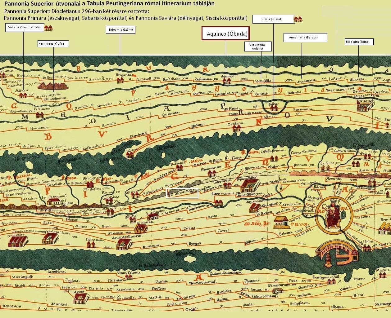 Porzione della Tabula Peutingeriana in cui è indicato il tracciato della Salaria che congiunge Roma all'Adriatico. Nel percorso della consolare è riportata la Mansio di Ad Martis, collocata dagli storici nella frazione di Tufo di Arquata del Tronto in provincia di Ascoli Piceno. La Mansio è evidenziata da una cornice rettangolare bianca.